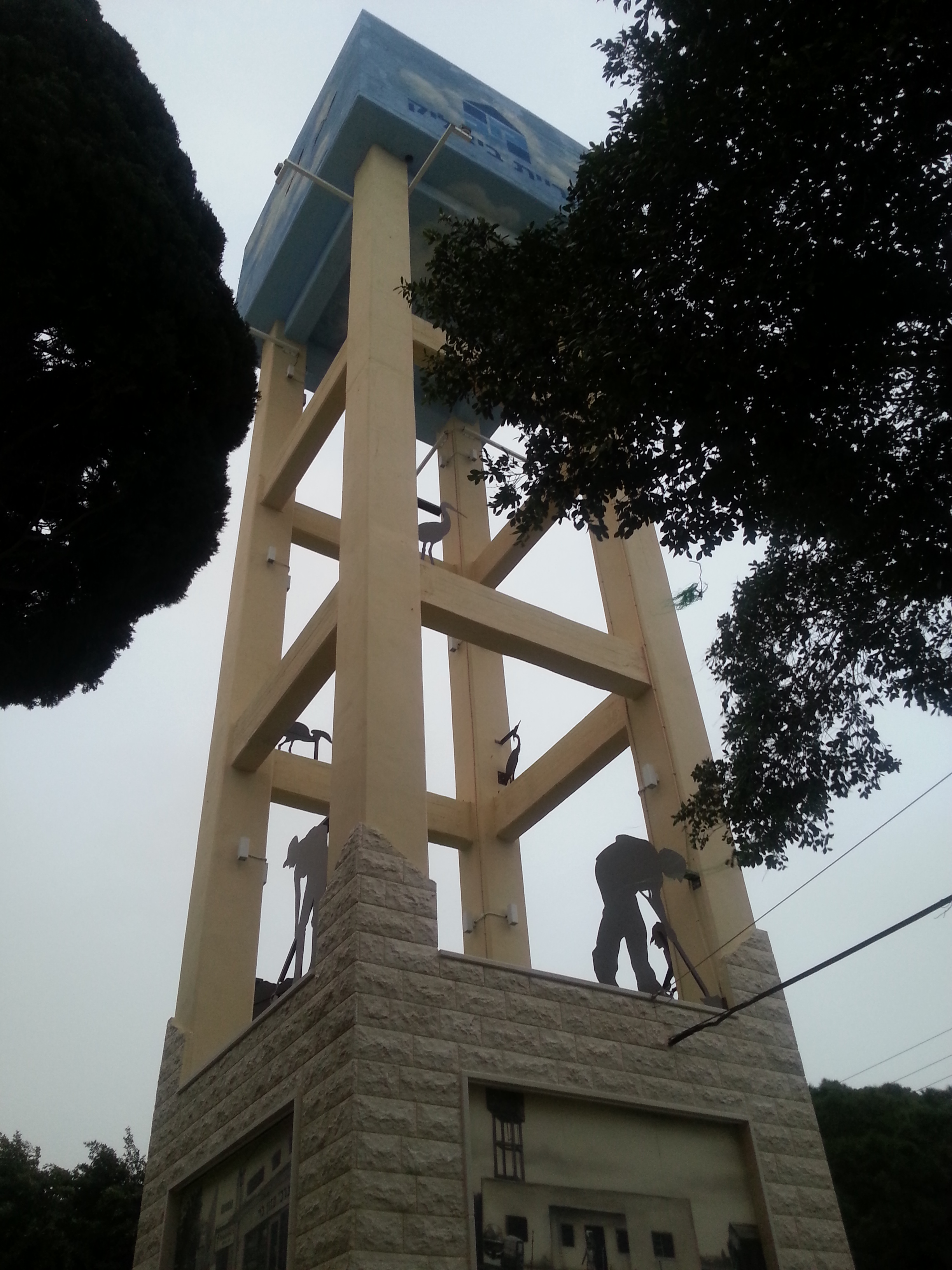 מגדל המים לאחר שיפוץ